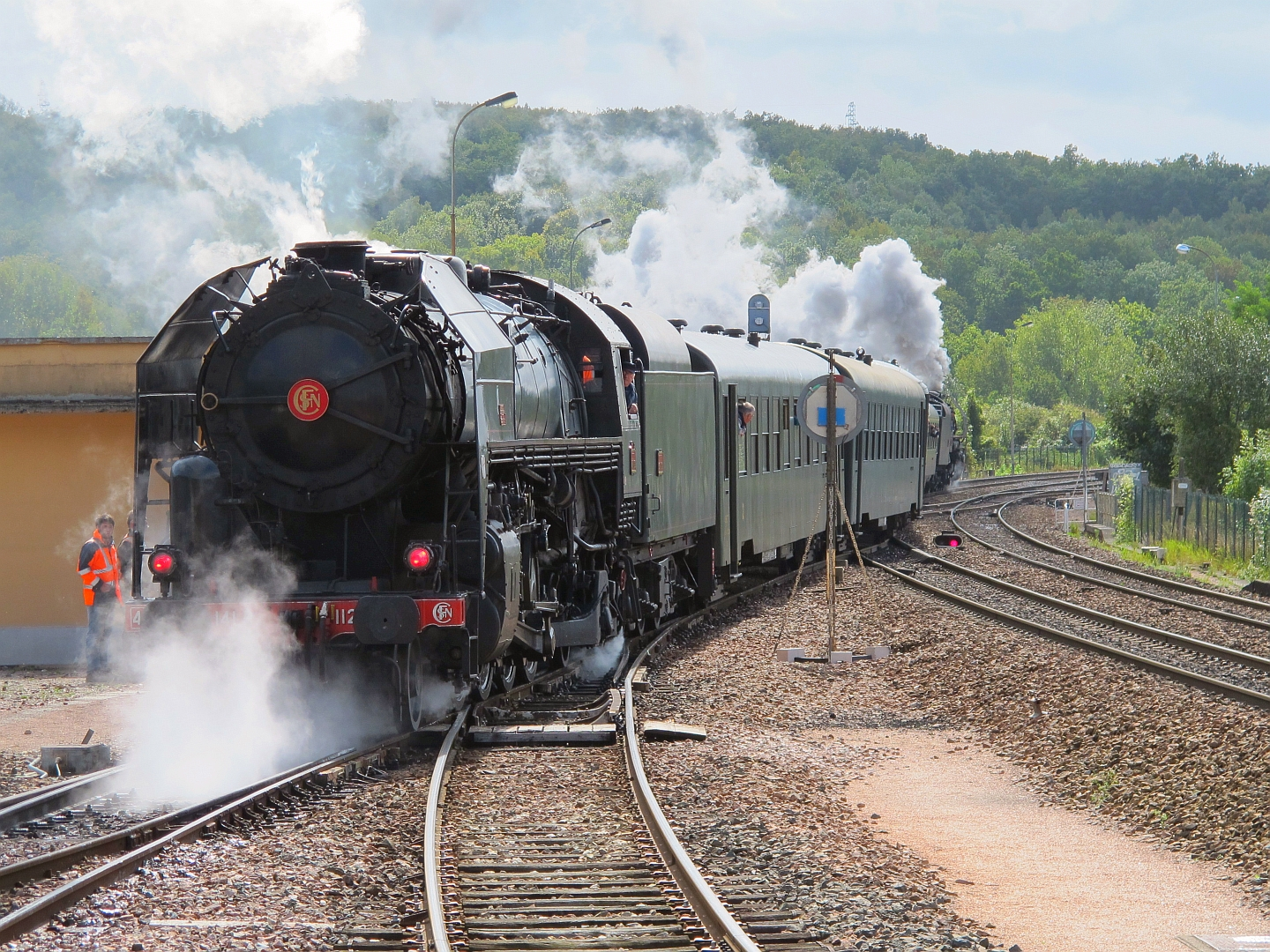 Un train spécial de l’AJECTA avec la 141 R 1126 en pousse, quitte la gare de Longueville et s’engage sur les voies principales de la ligne 4 le 18 septembre 2011.